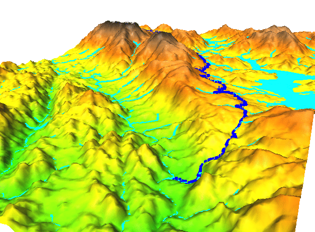 Der Unterlauf des Schwarzenbergschen Schwemmkanals